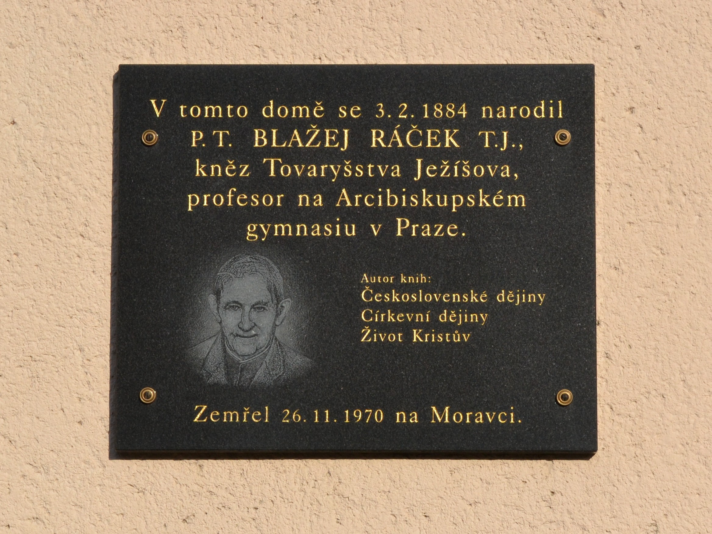 Křoví - Blažej Ráček, pamětní deska na čp. 23